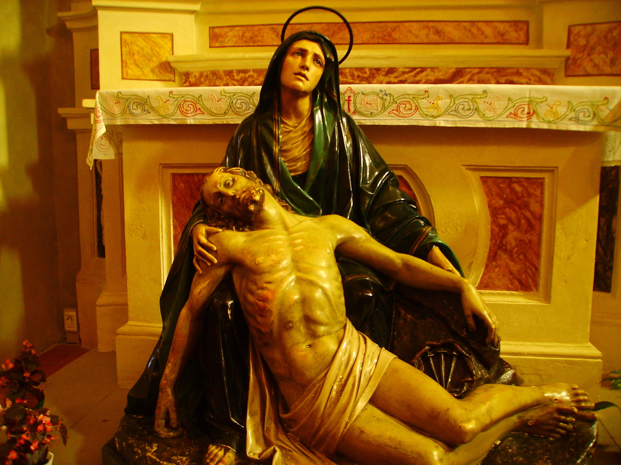 Pietà in Redeemer Church in Montevarchi